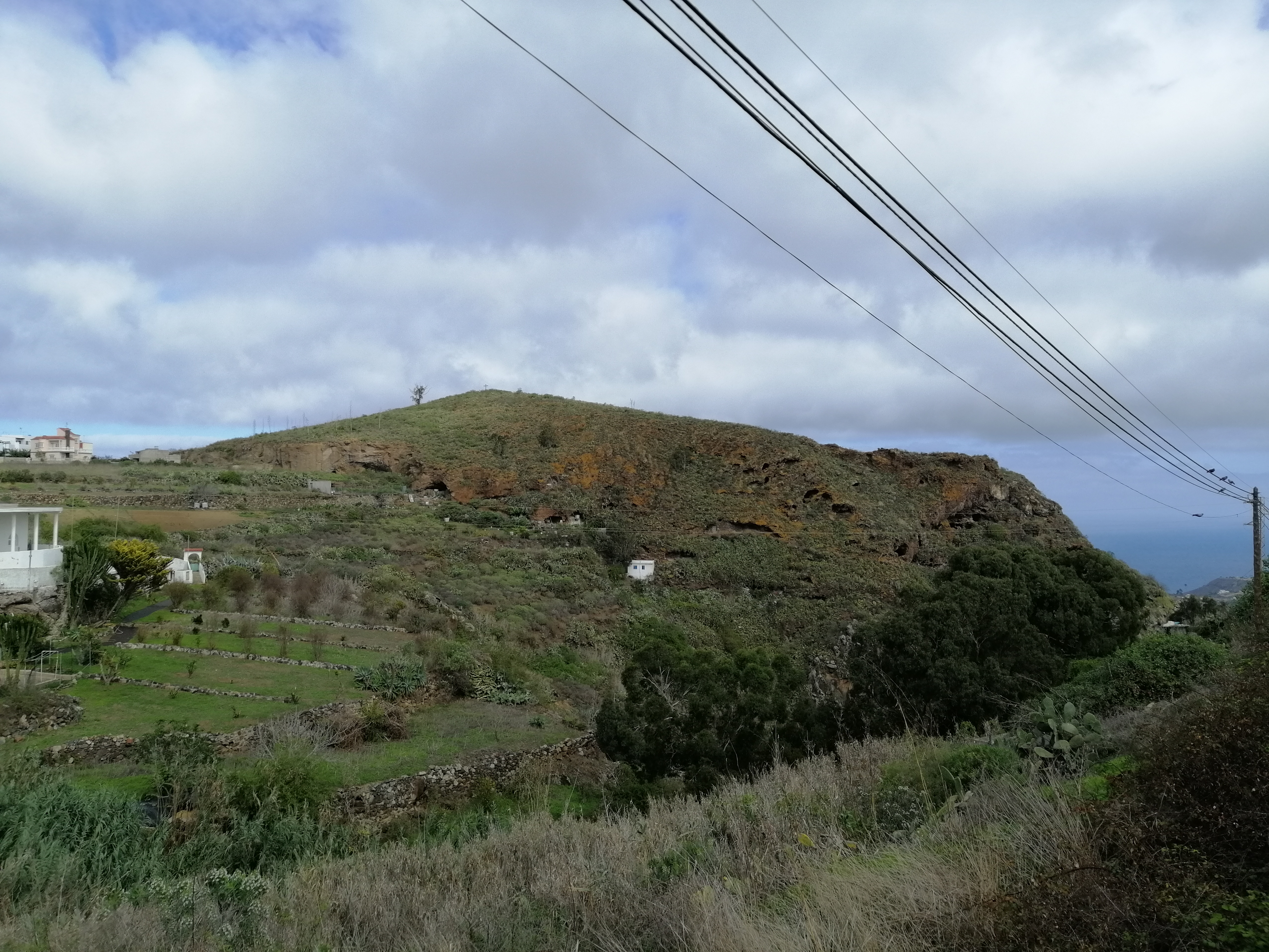 La imagen muestra el yacimiento desde la carretera que lleva al barrio de Trujillo en el municipio de Moya